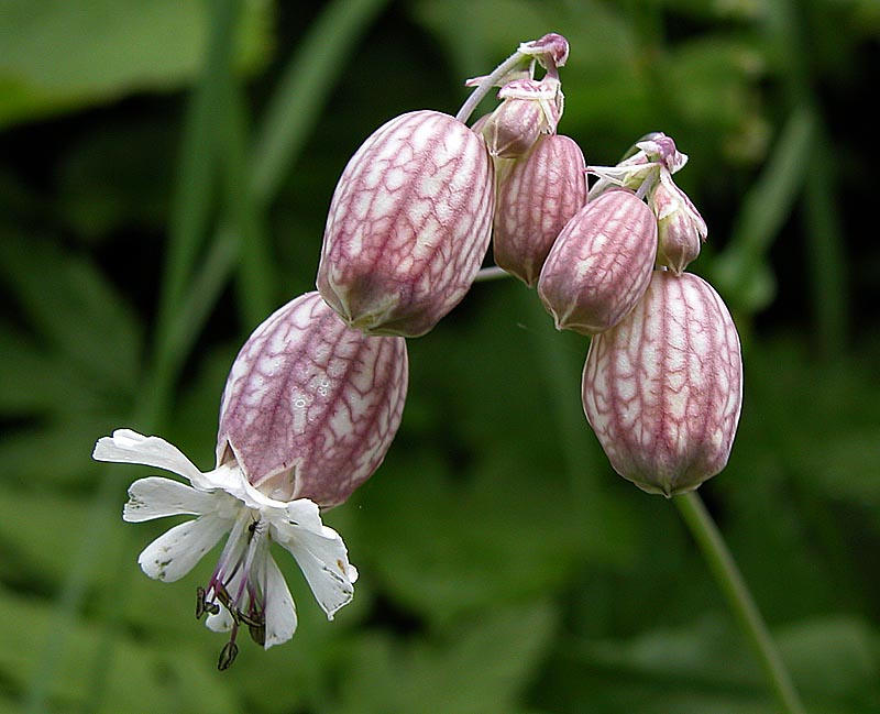 Aufgeblasenes Leimkraut bzw. Taubenkropf-Leimkraut (Silene vulgaris), aufgenommen im Gerstrubental (Allgäuer Alpen)